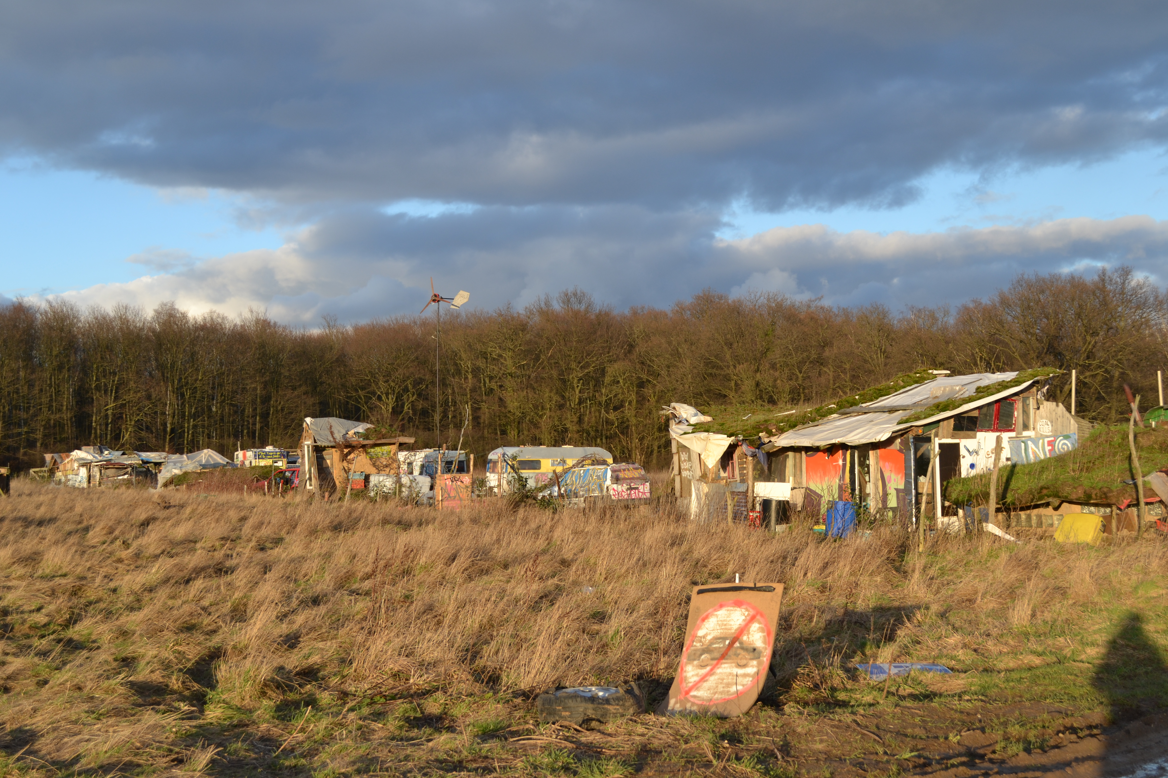 Unterkünfte der Widerstandskämpfer, die sich gegen die Zerstörung des Hambacher Forsts einsetzen